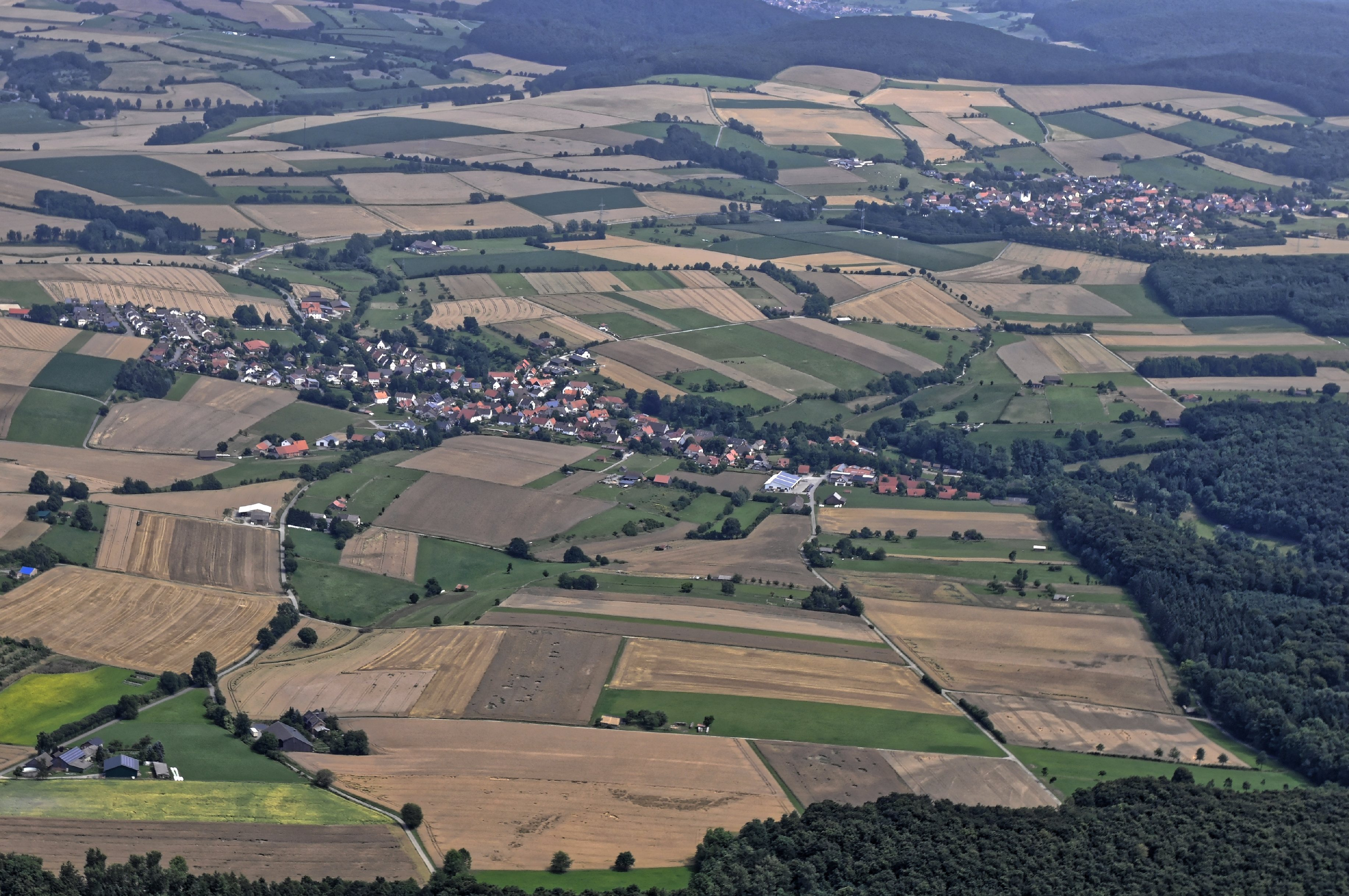 Bilder vom Flug Nordholz-Hammelburg 2015: Bellersen (links) und Bökendorf (rechts)